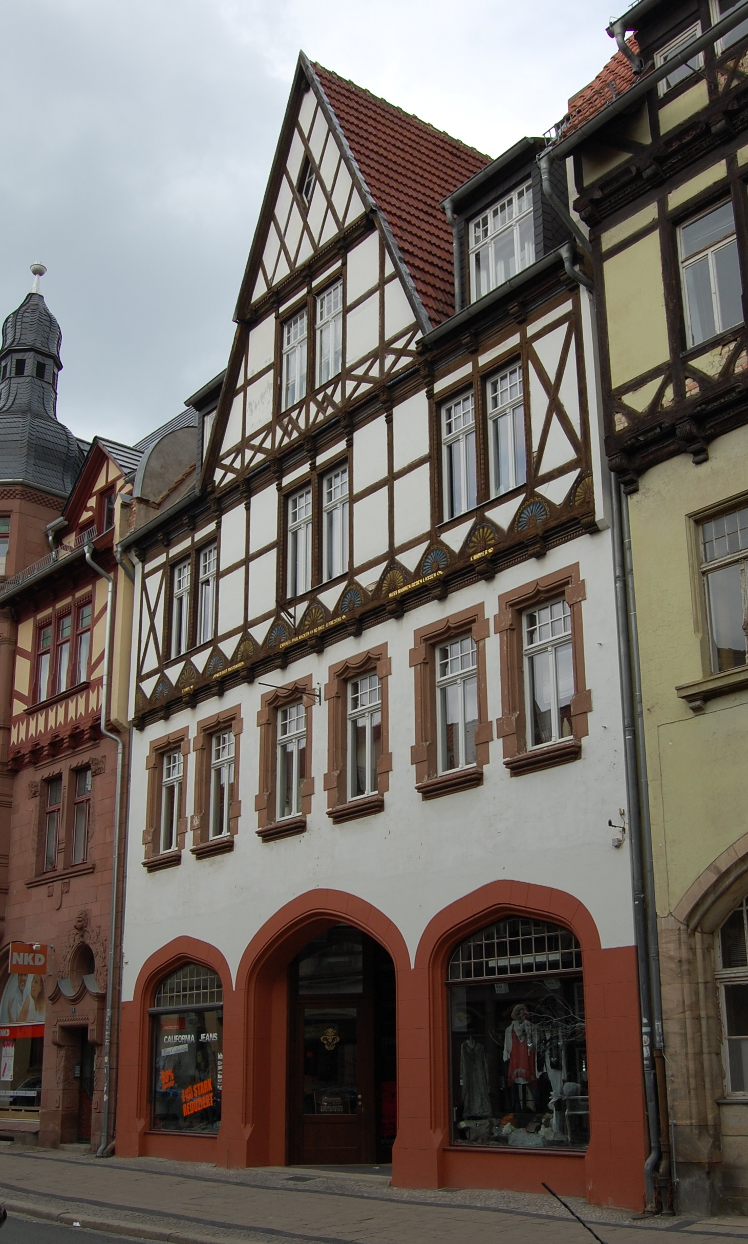 Quedlinburg Heiligegeistraße 5